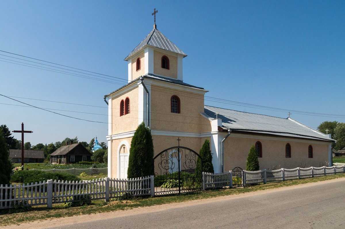 Чарневічы. Адноўлены касцёл